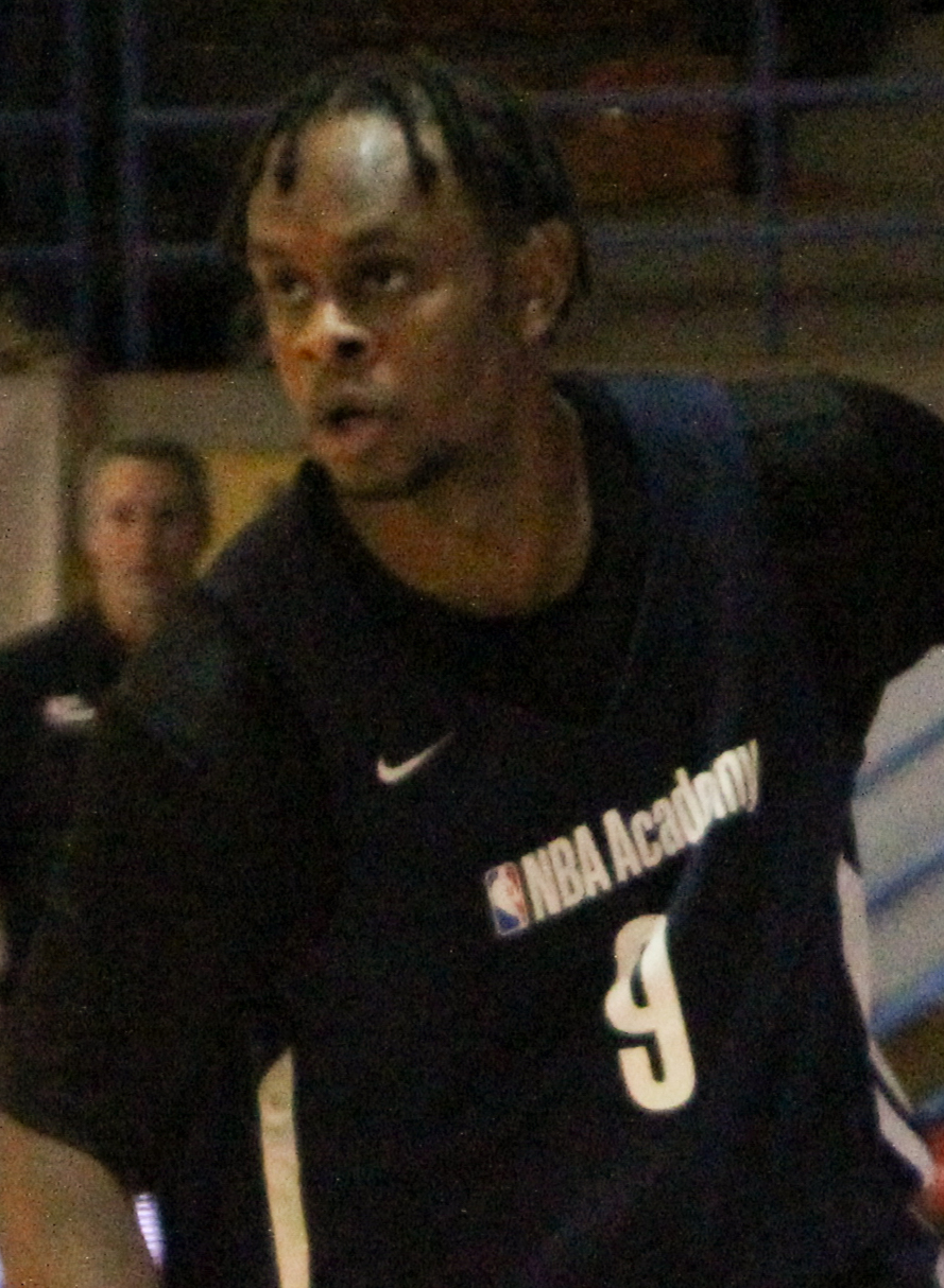 Joventut de Badalona - NBA Academy